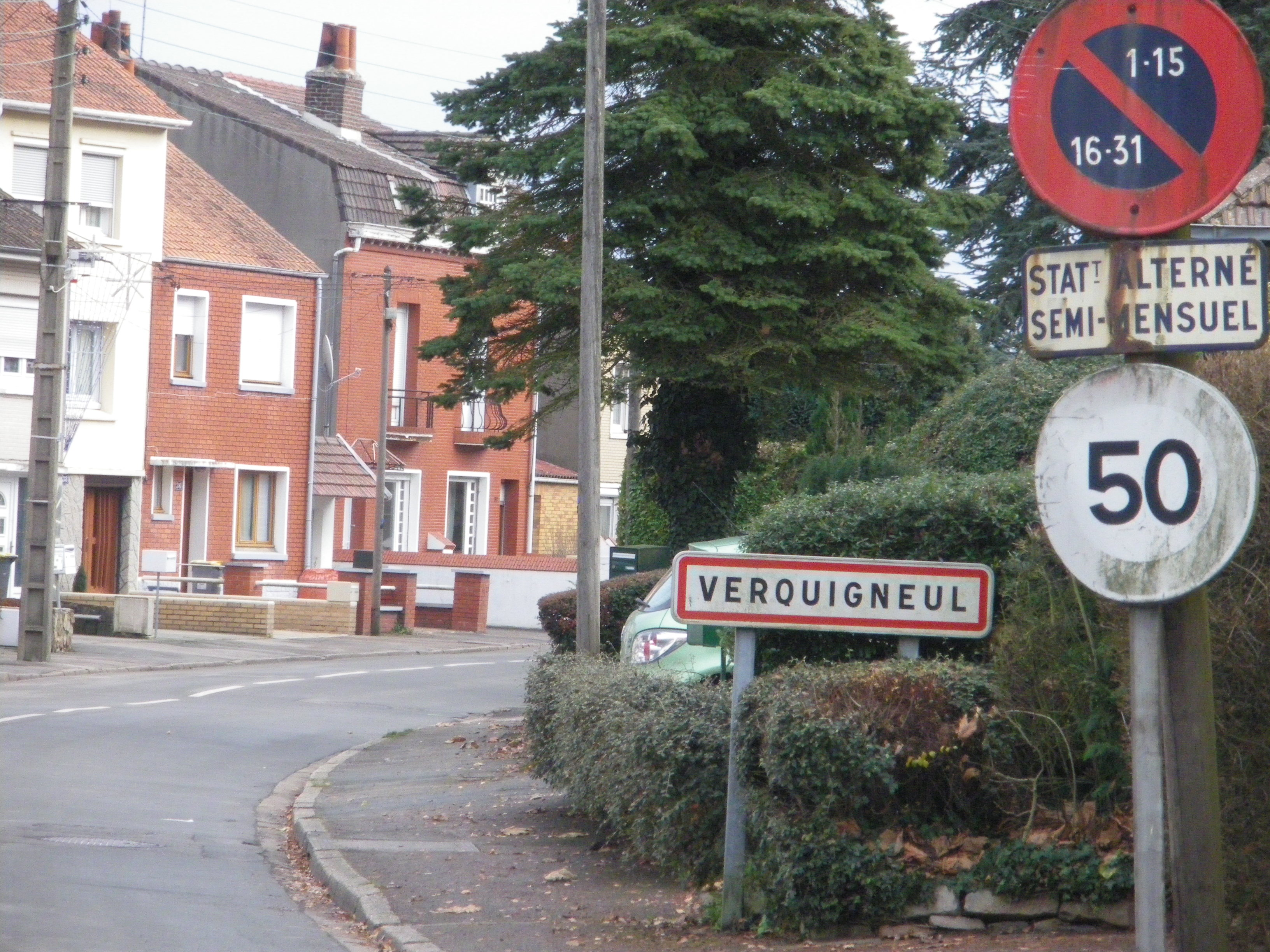 Panneau d'entrée de la commune de Verquigneul.